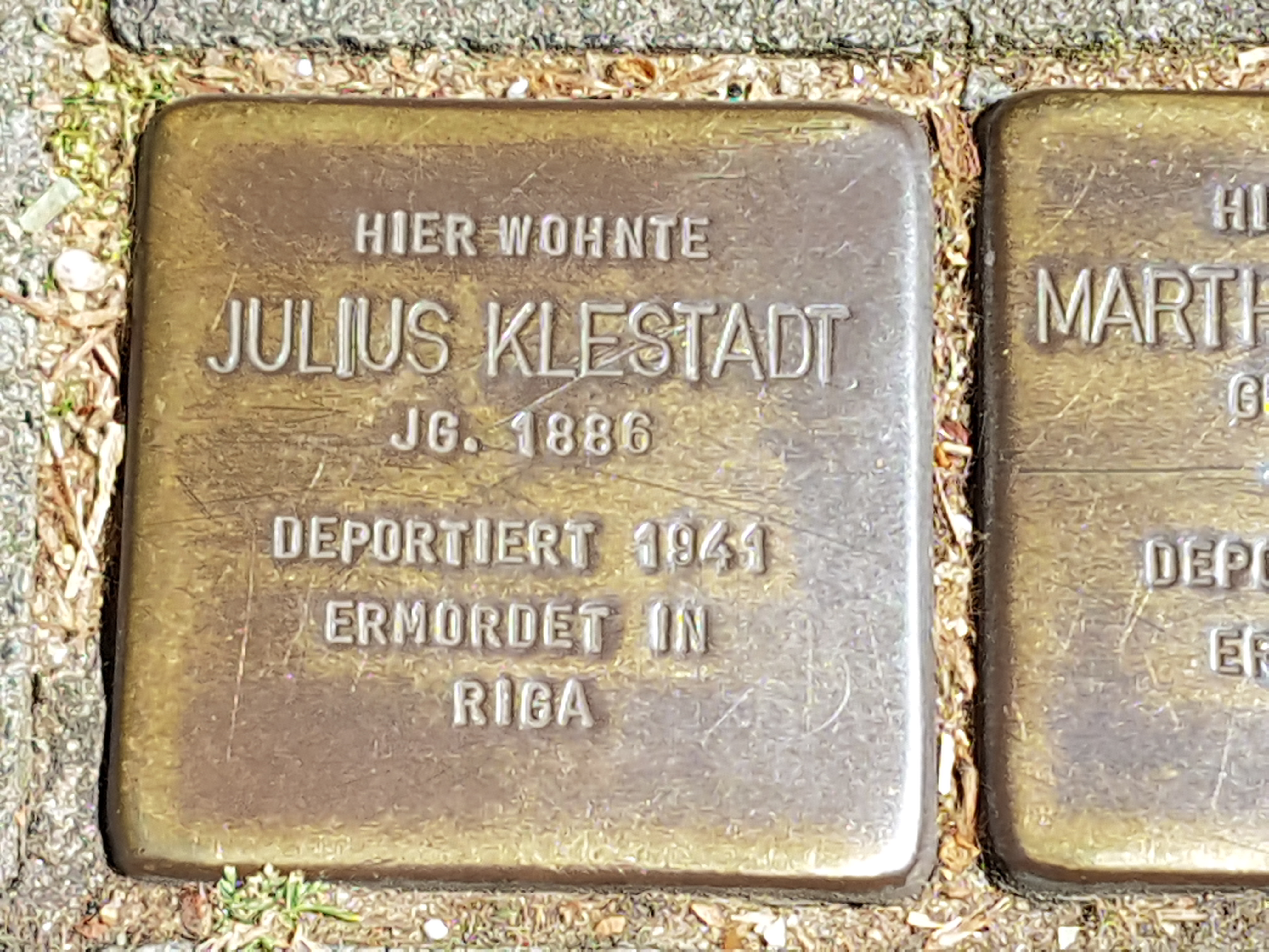 Stolperstein Duisburg